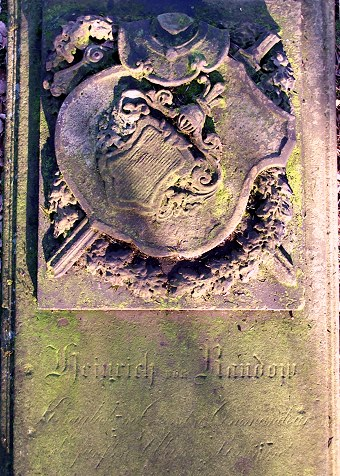 Grabstein des Heinrich Gustav von Randow in Düsseldorf.